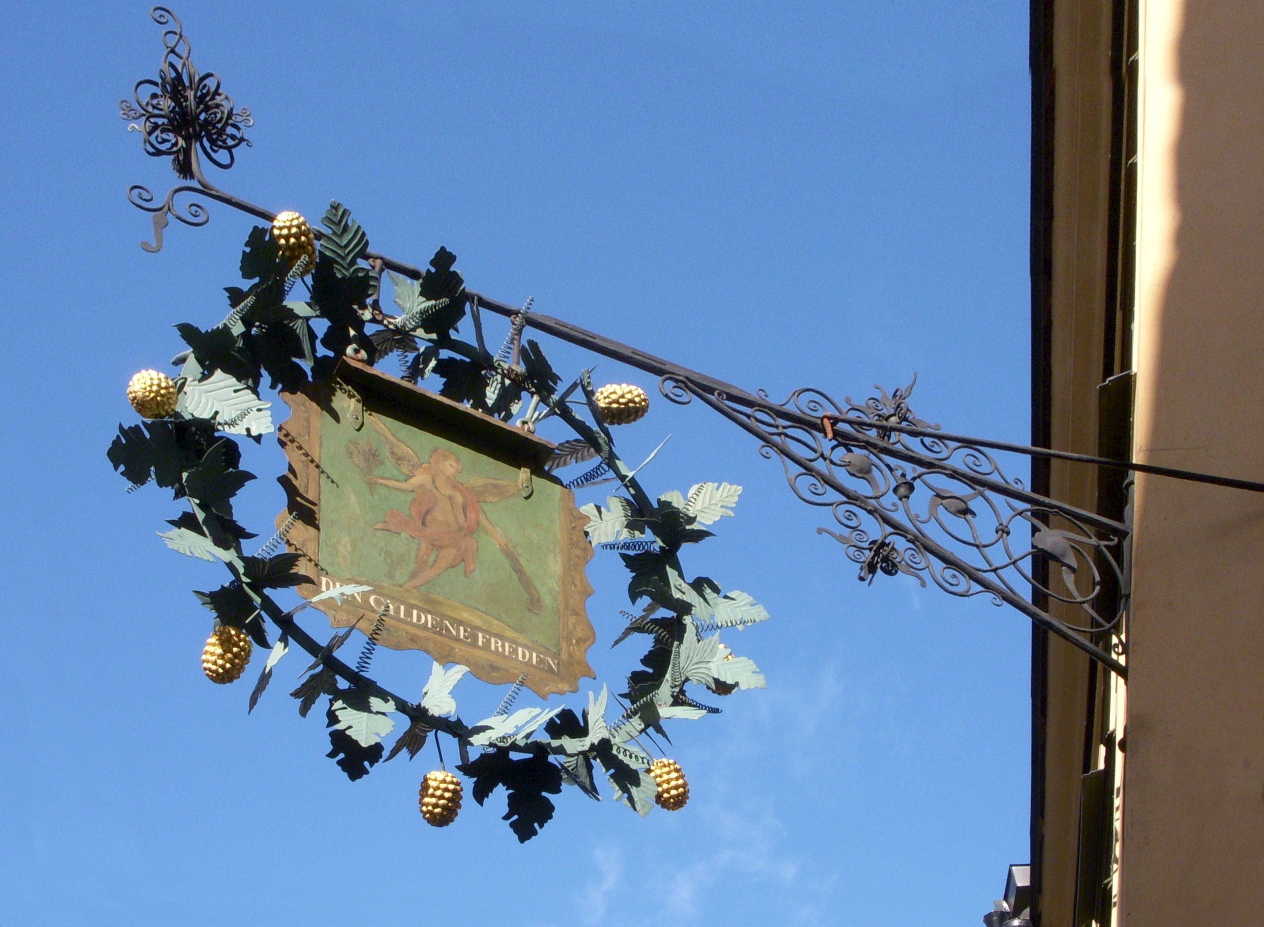 Skylt till restaurangen "Den Gyldene Freden" i Gamla stan, Stockholm